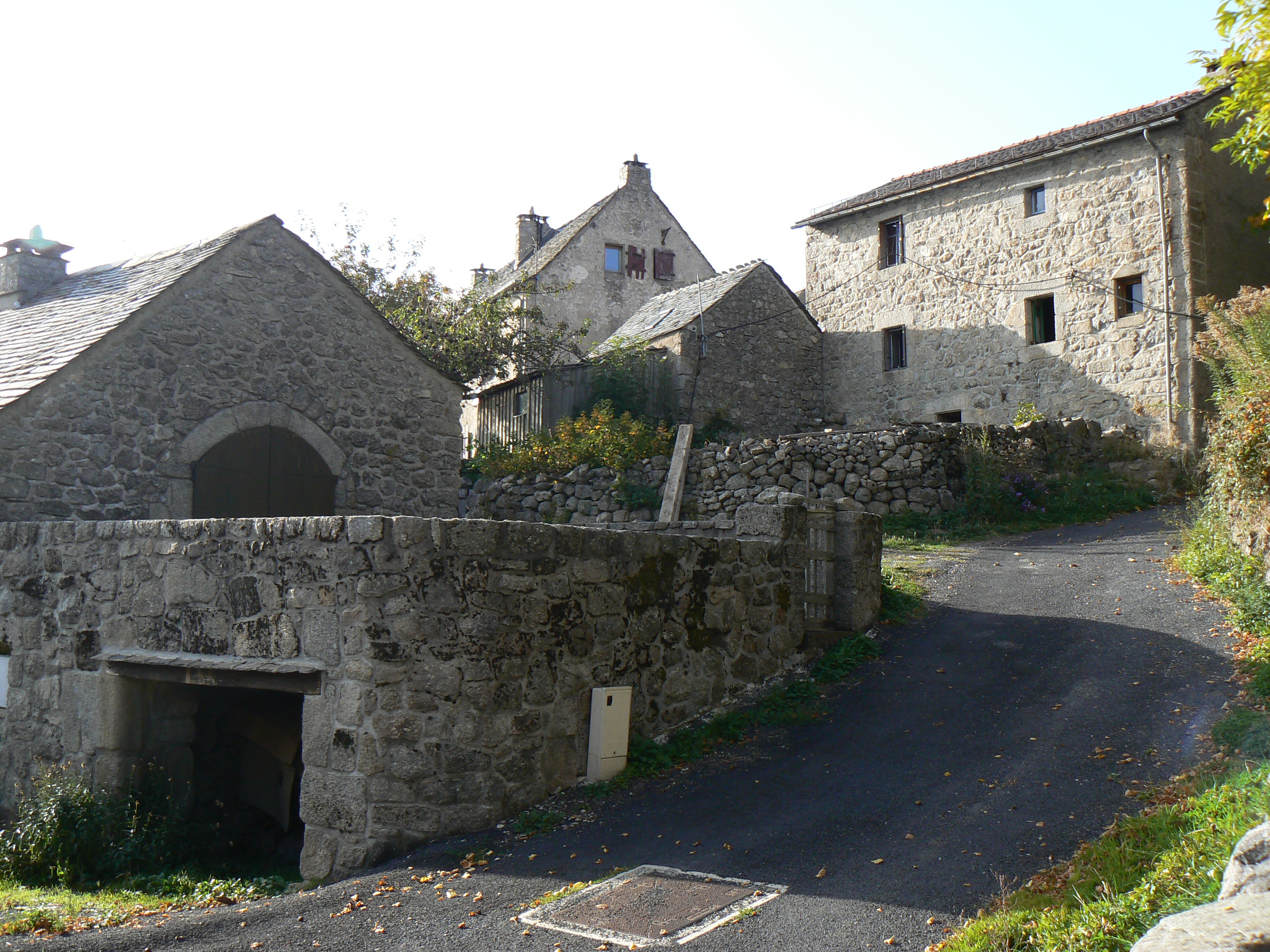 Rue de Fraissinet-de-Lozère en Lozère (France)